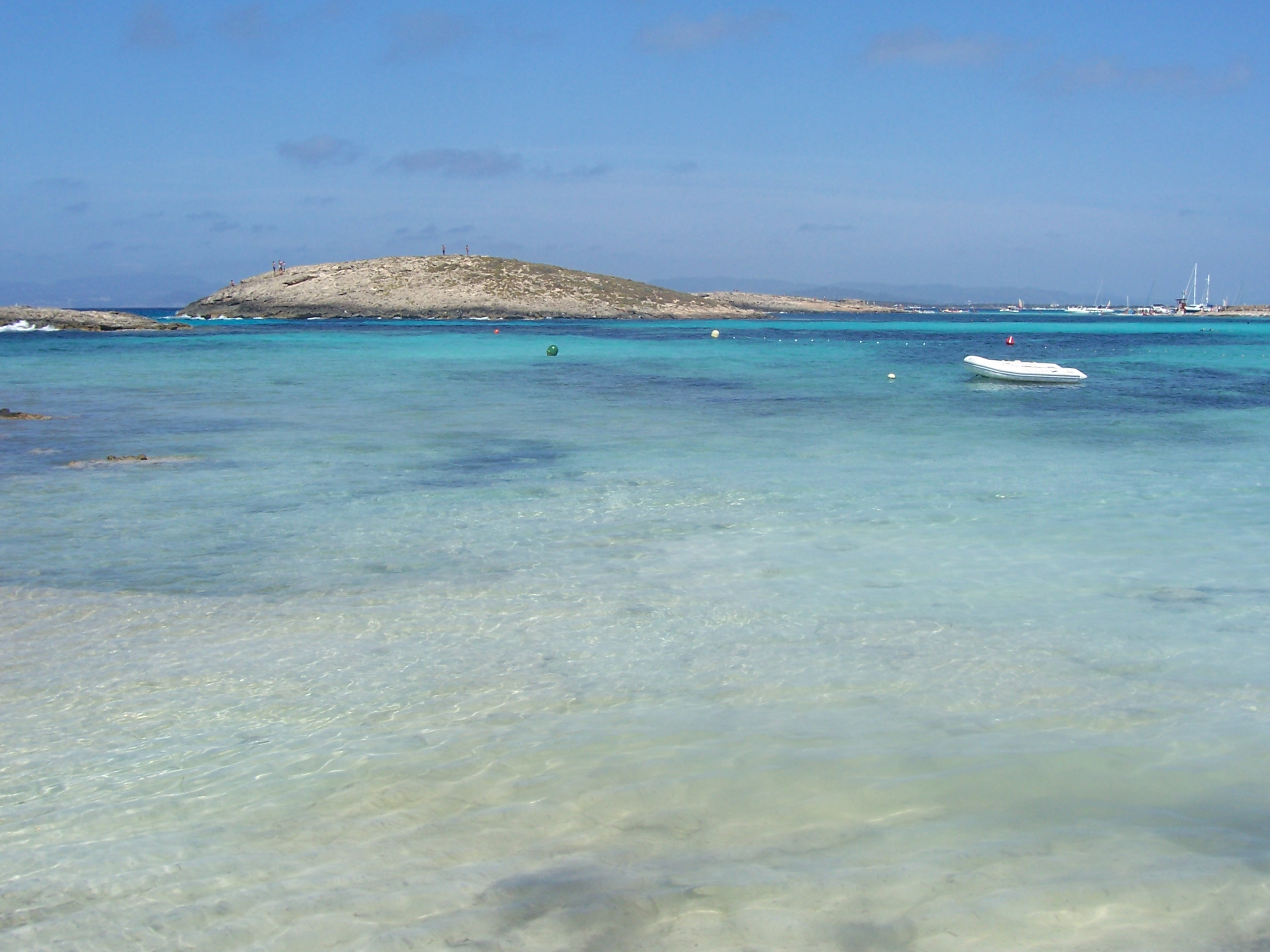 Formentera, Playa Illetes